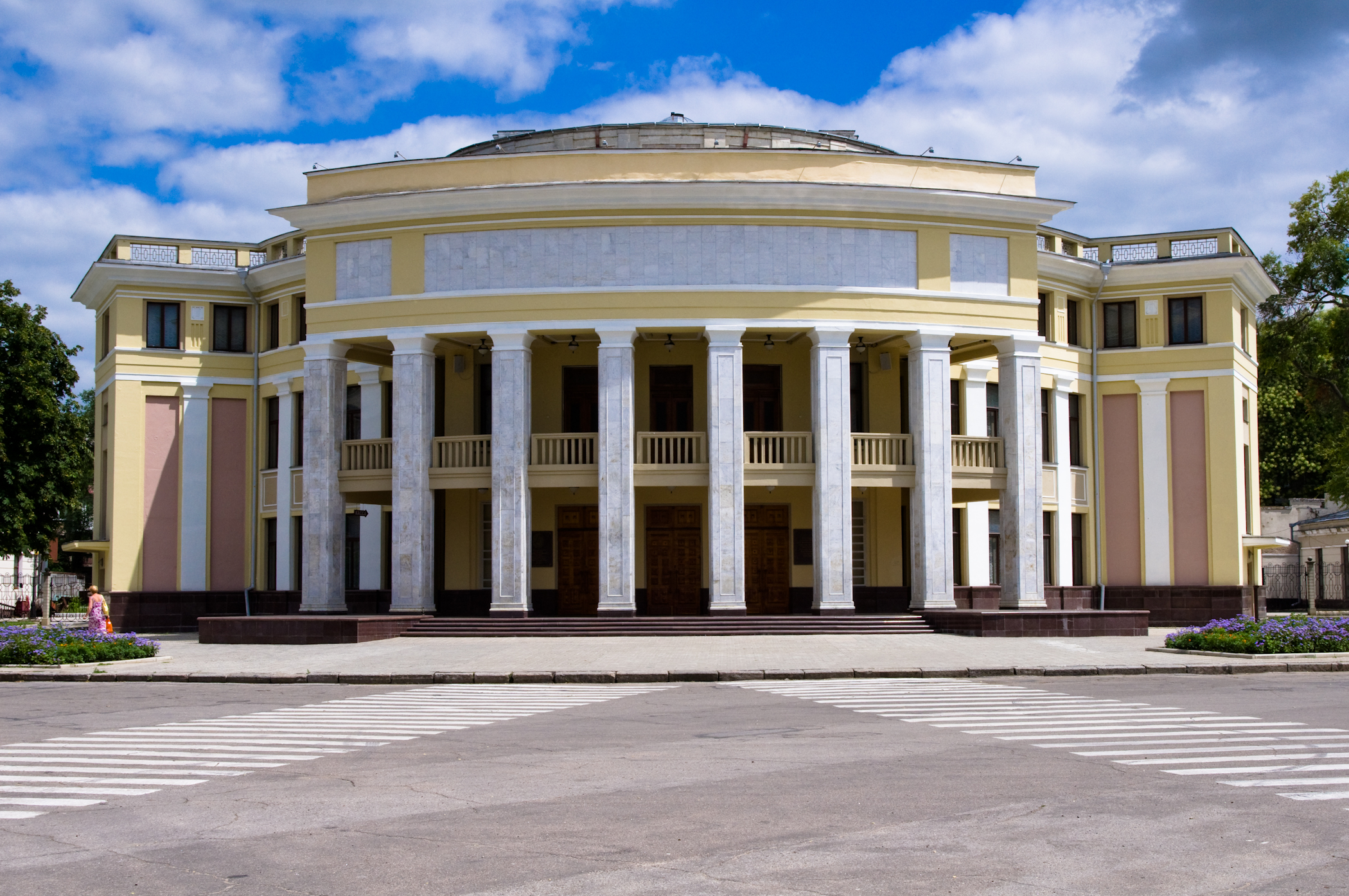 Тираспол, Приднестро́вский госуда́рственный теа́тр дра́мы и коме́дии им. Н. С. Аронецкой